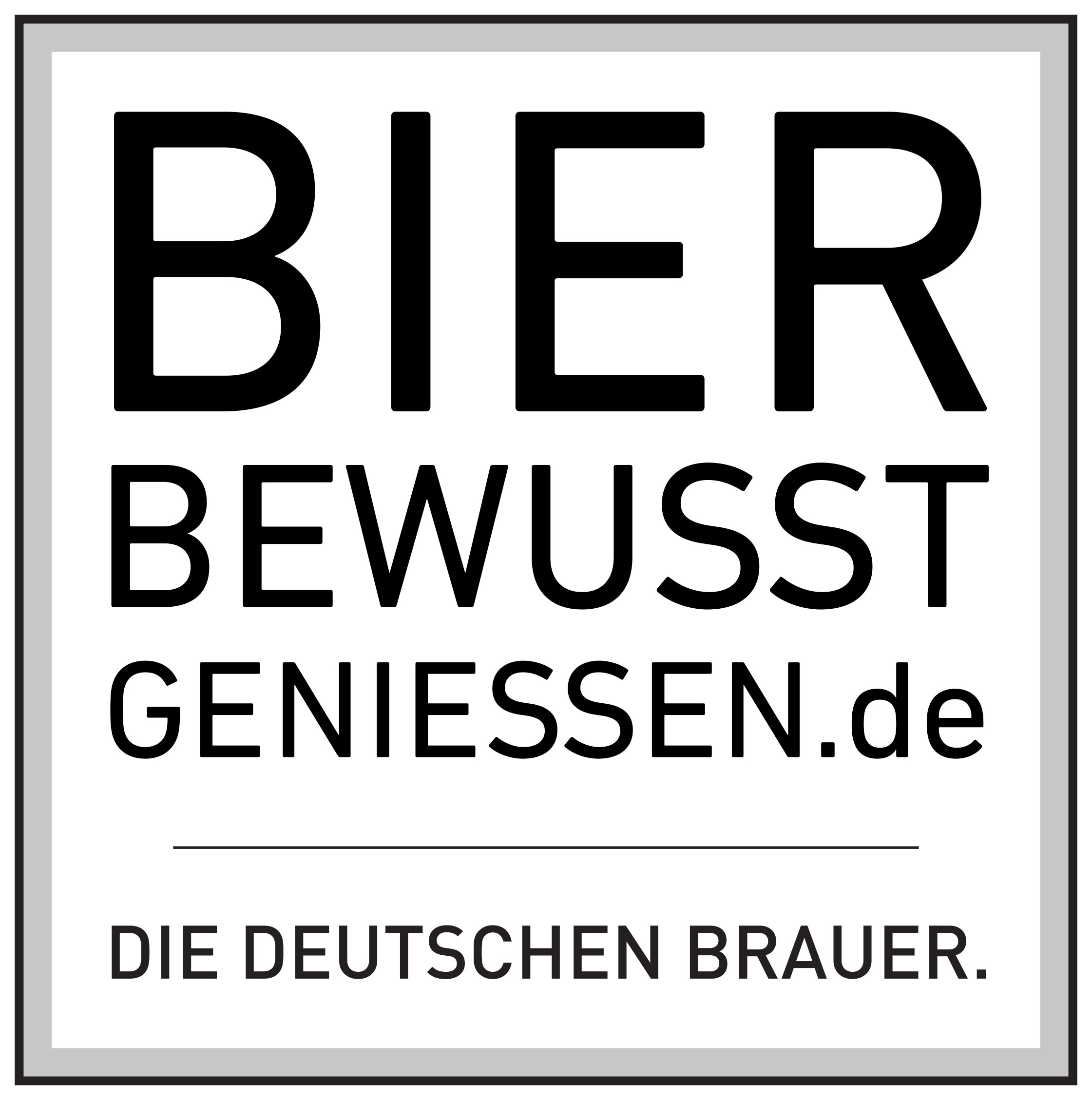 Die Präventionskampagne der deutschen Brauer. Bewusster Genuss und verantwortlicher Umgang setzen Wissen voraus, über die richtigen Lebensphasen und ein risikoarmes Umfeld. So muss Bier für Kinder und Jugendliche unter 16 tabu sein. Auch Schwangere und Stillende sollten ganz auf alkoholische Getränke verzichten. Wer Auto fährt oder Sport treibt, einer gefahrgeneigten Arbeit nachgeht oder Medikamente einnimmt, muss sich ebenfalls der Wirkung von Alkohol bewusst sein.